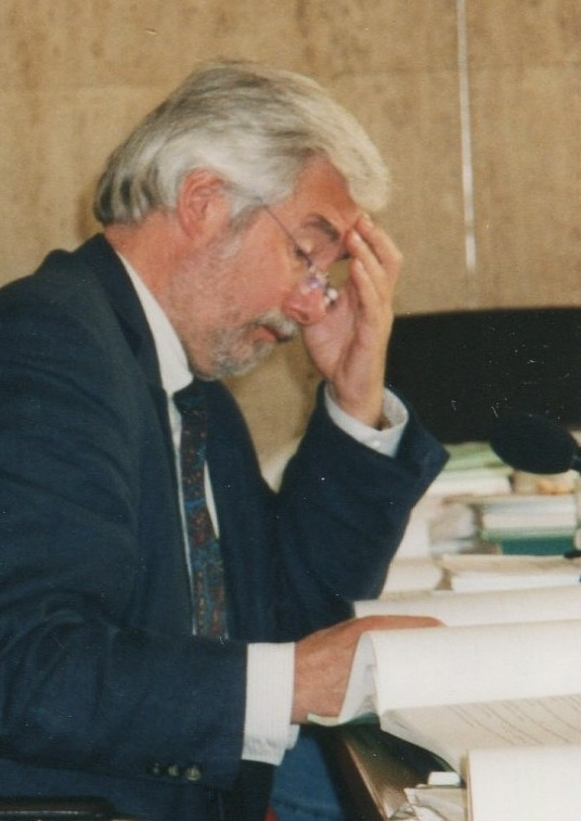 Porträt Gerd Börnsen